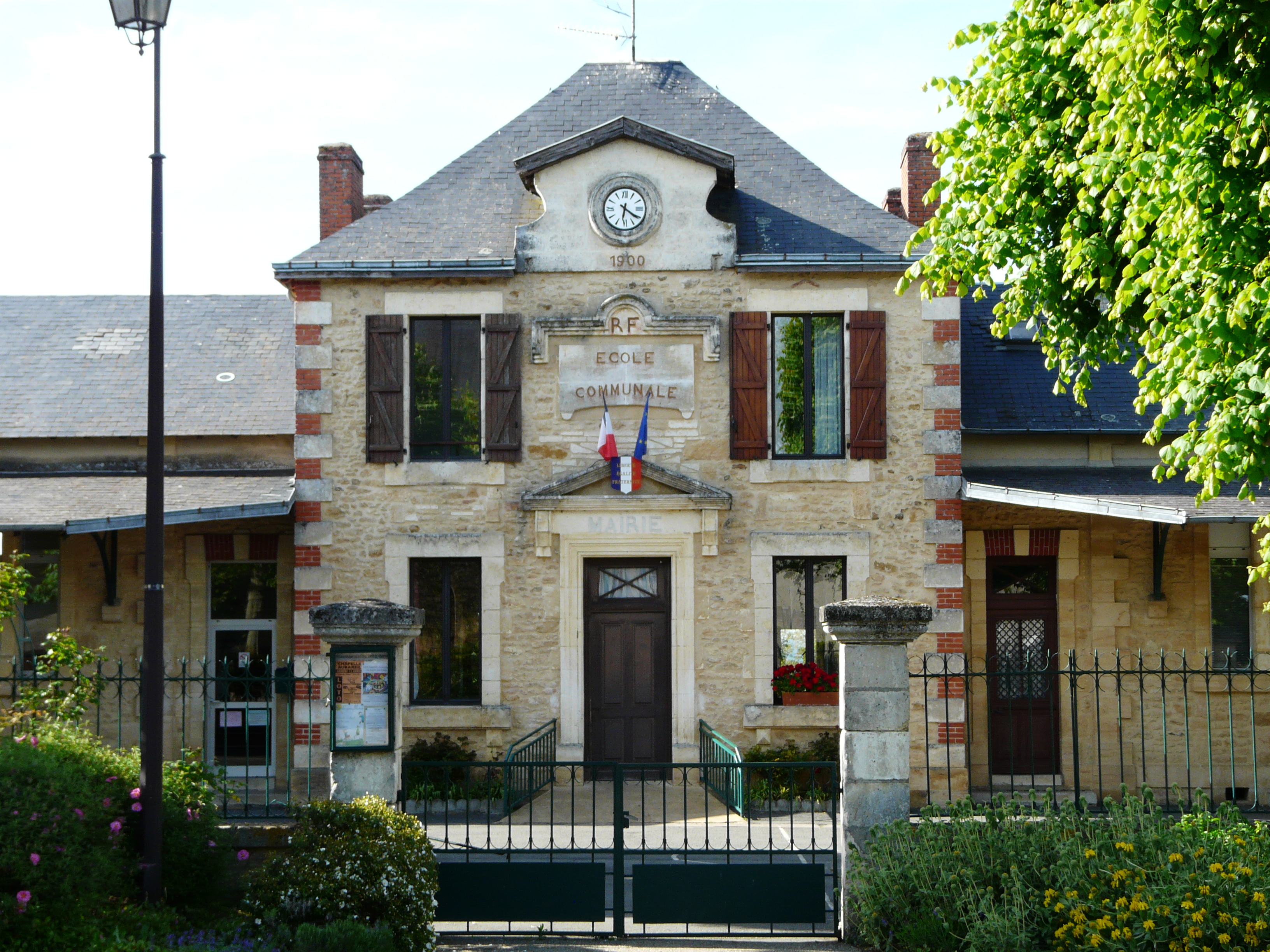 L'ancienne mairie de La Chapelle-Aubareil, Dordogne, France.